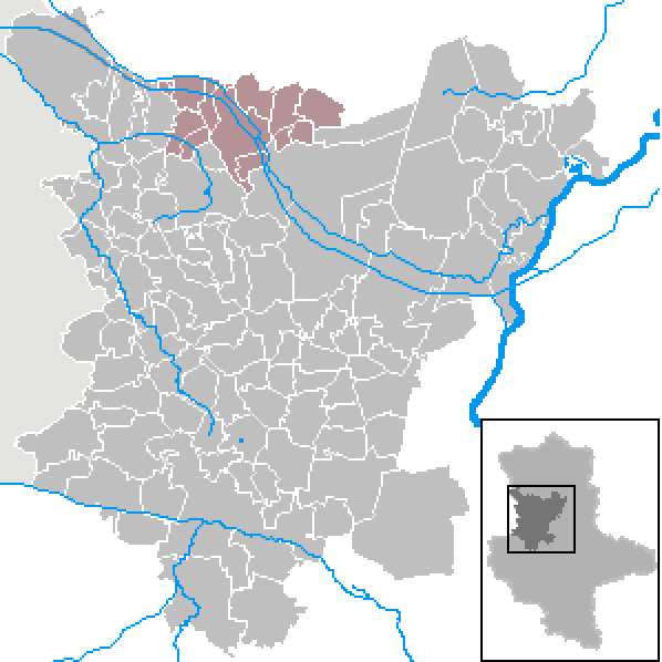 Karte,Verwaltungsgemeinschaft Calvörde in den Grenzen des Landkreis Börde.